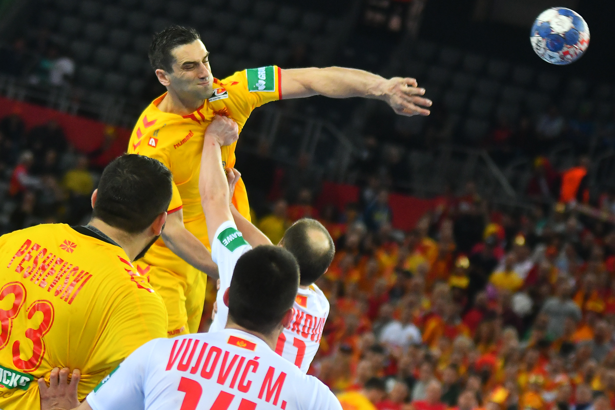 EHF EURO 2018 Crna Gora - Makedonija 15.01.2018